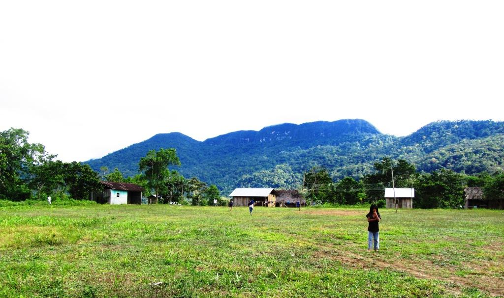 Kuankus (Coangos)